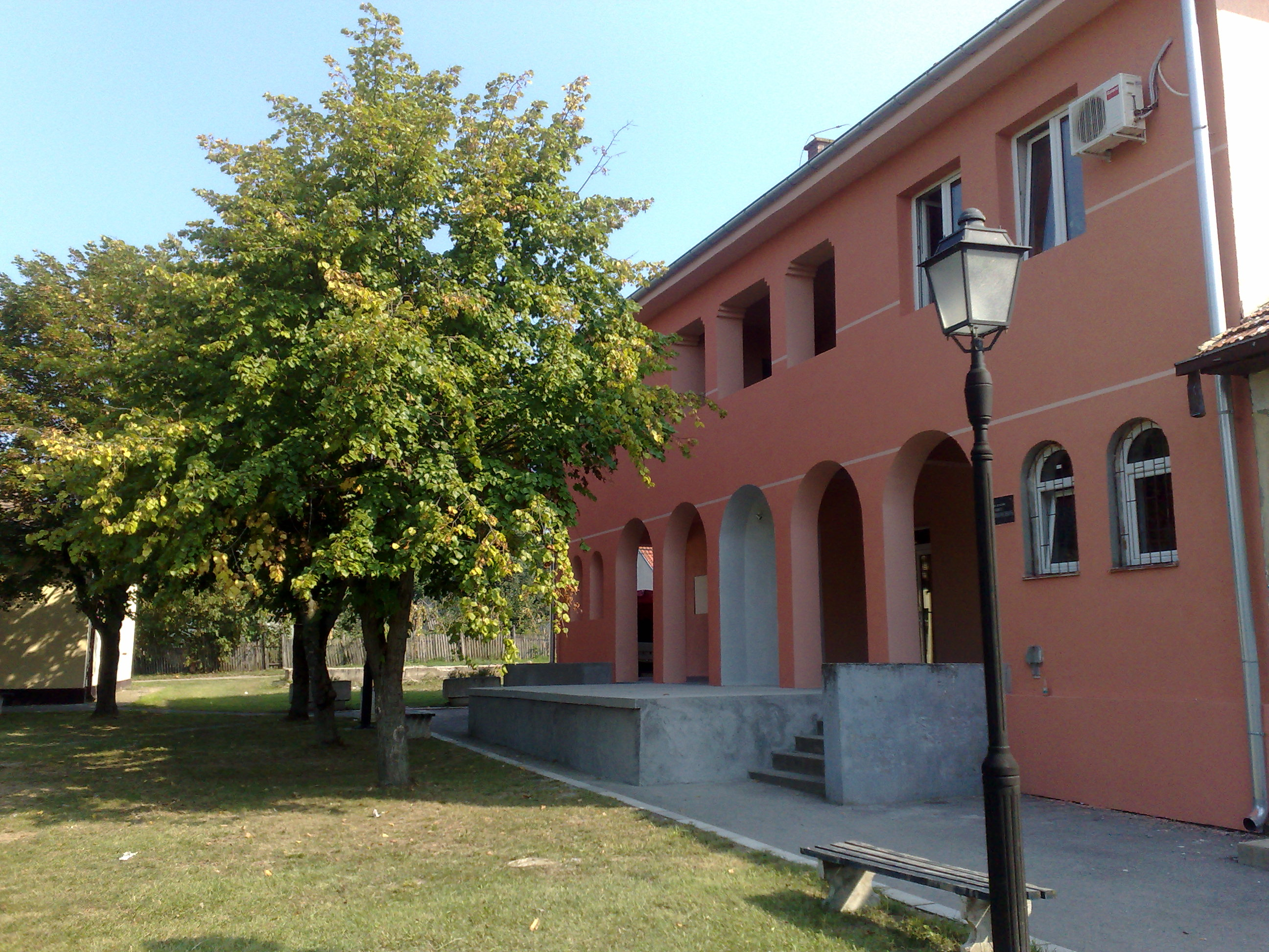 Trg Palih Boraca